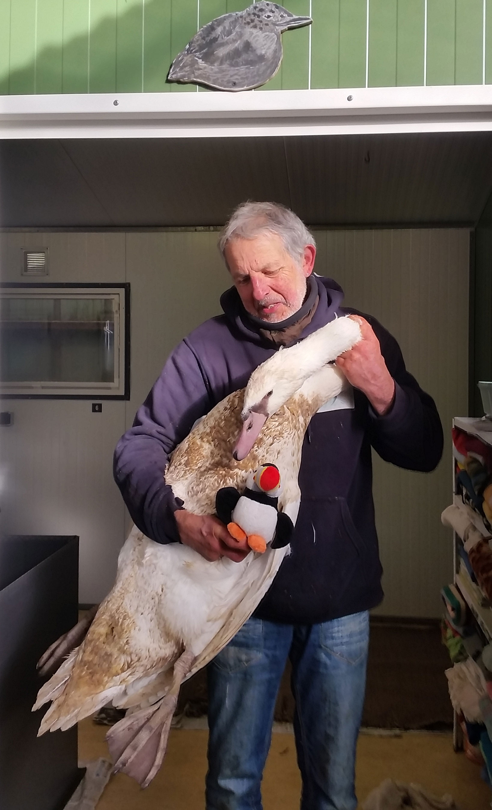 Didier Masci, président du centre de sauvegarde des animaux Volée de piafs, se prépare à remettre un cygne en liberté, à Languidic dans le Morbihan, en décembre 2018.